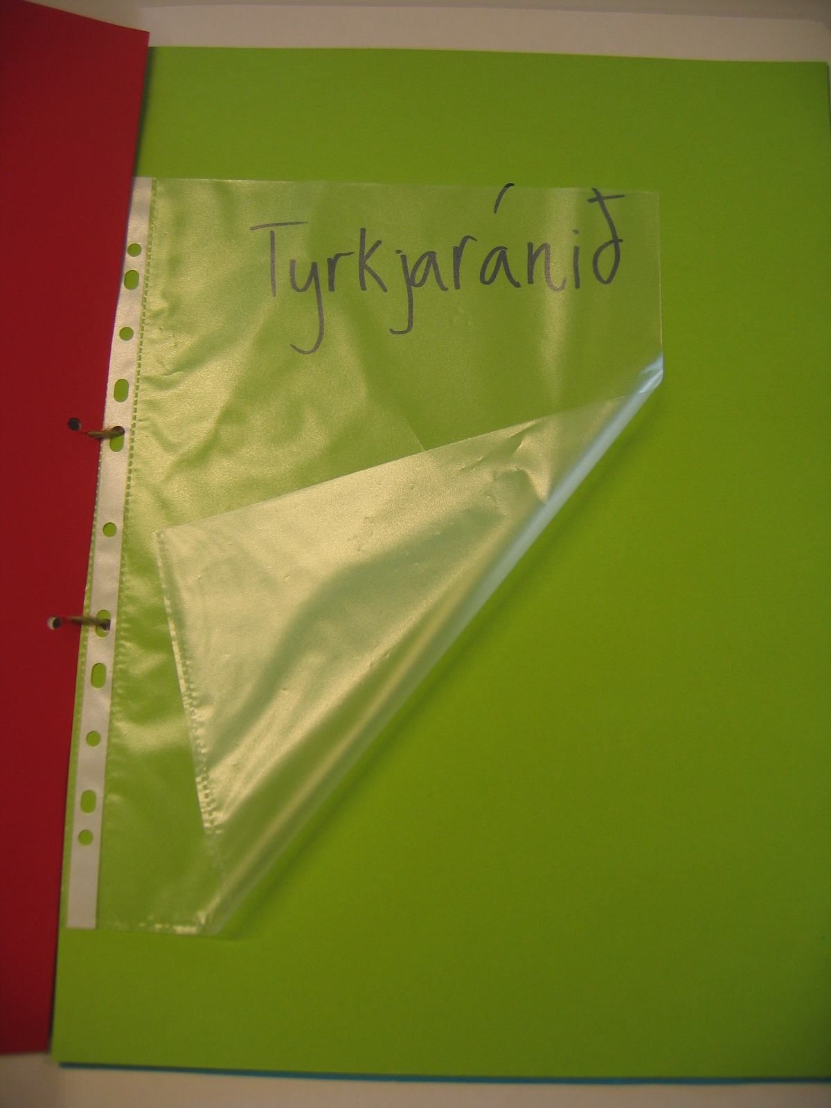 Lýsing ferilmappa innan